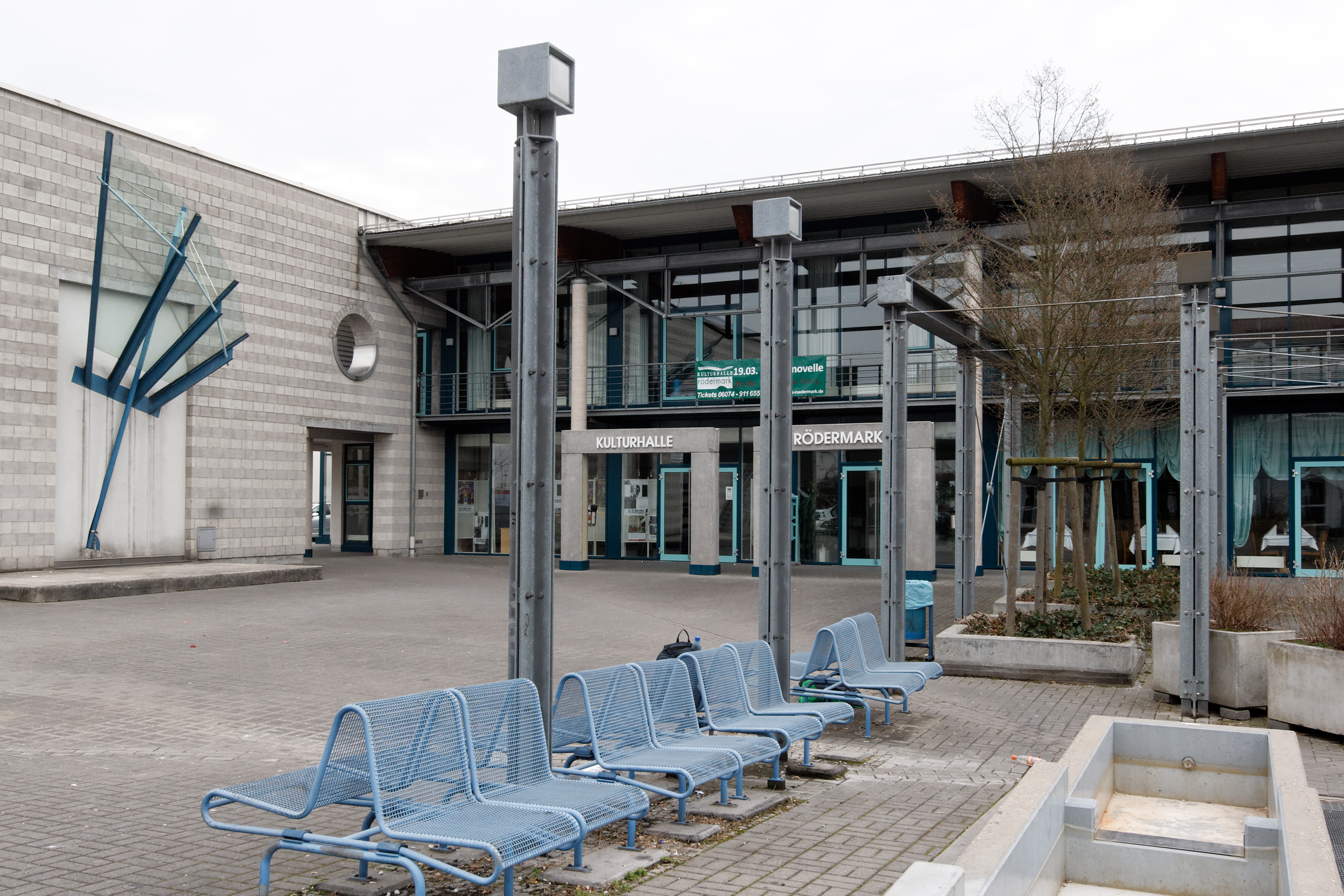 Kulturhalle in Ober-Roden (Stadt Rödermark), eingeweiht 1995.